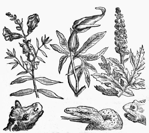 Associations de plantes et d'animaux, d'après Della Porta, Phytognomonica (1589)